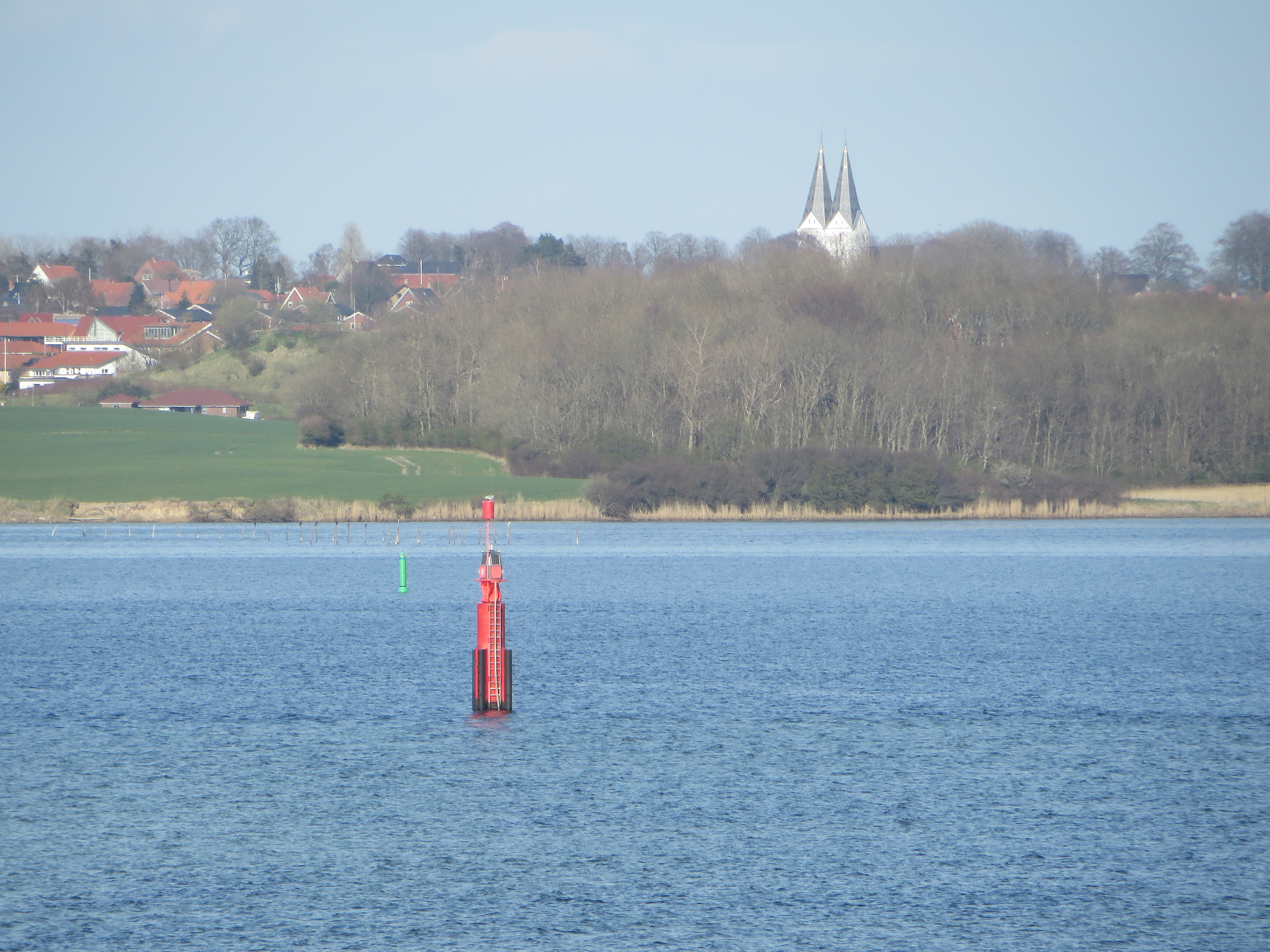 Broacker mit Kirche von Holnis aus (2015-04-19), Bild 03